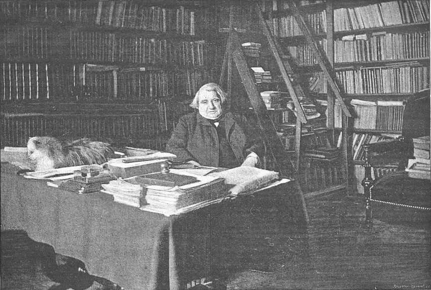 Ernest Renan chez lui par Dornac